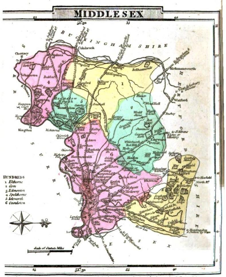 Middlesex